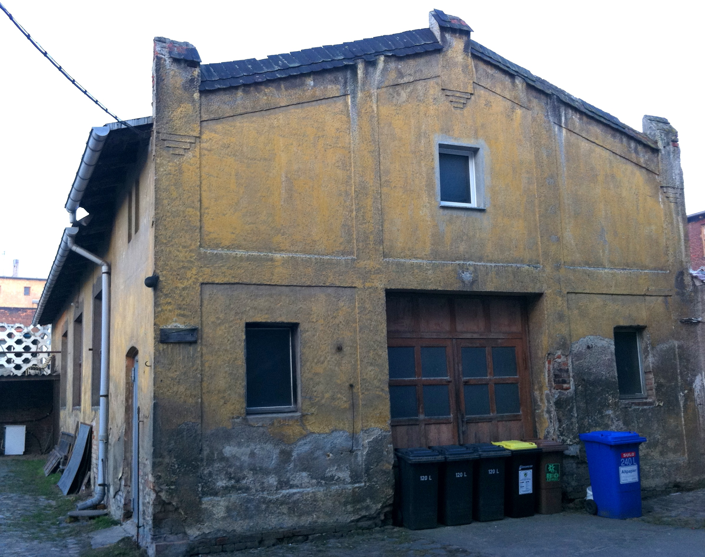 ehemaliger Kinosaal in Magdeburg-Westerhüsen auf dem Hof des Hauses Alt Westerhüsen 15